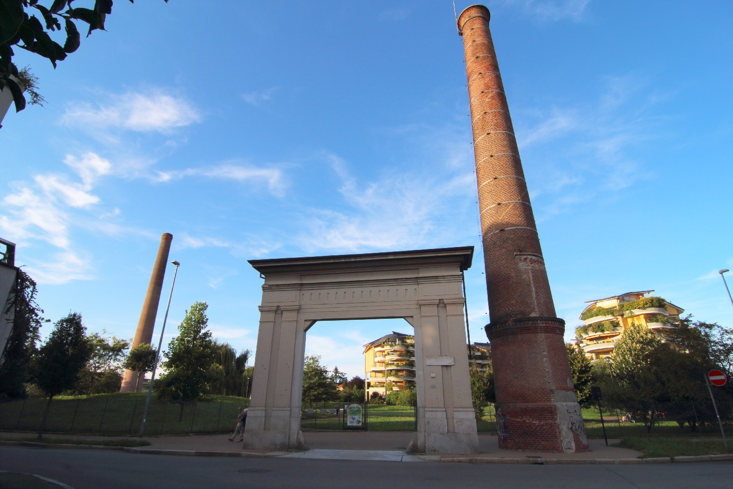 ingresso Parco Milani This is a photo of a monument which is part of cultural heritage of Italy.